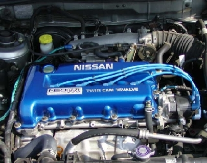 Nissan SR16VE engine.